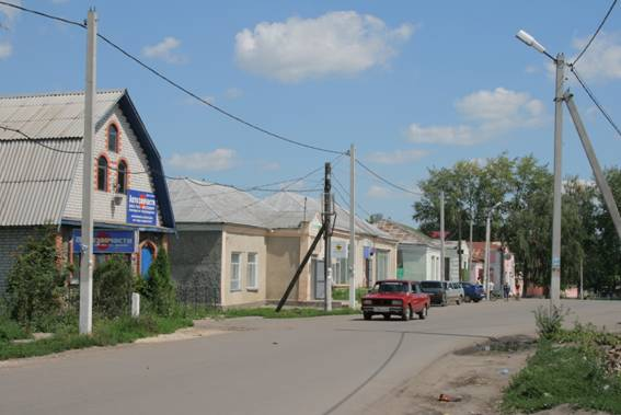 Тамбовская область, село Петровское